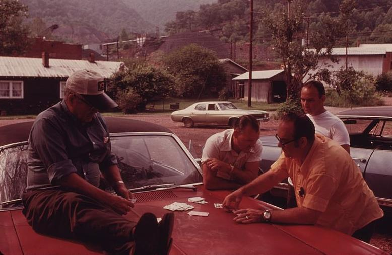 PIQUETE en la mina BROOKSIDE en HARLAN COUNTY